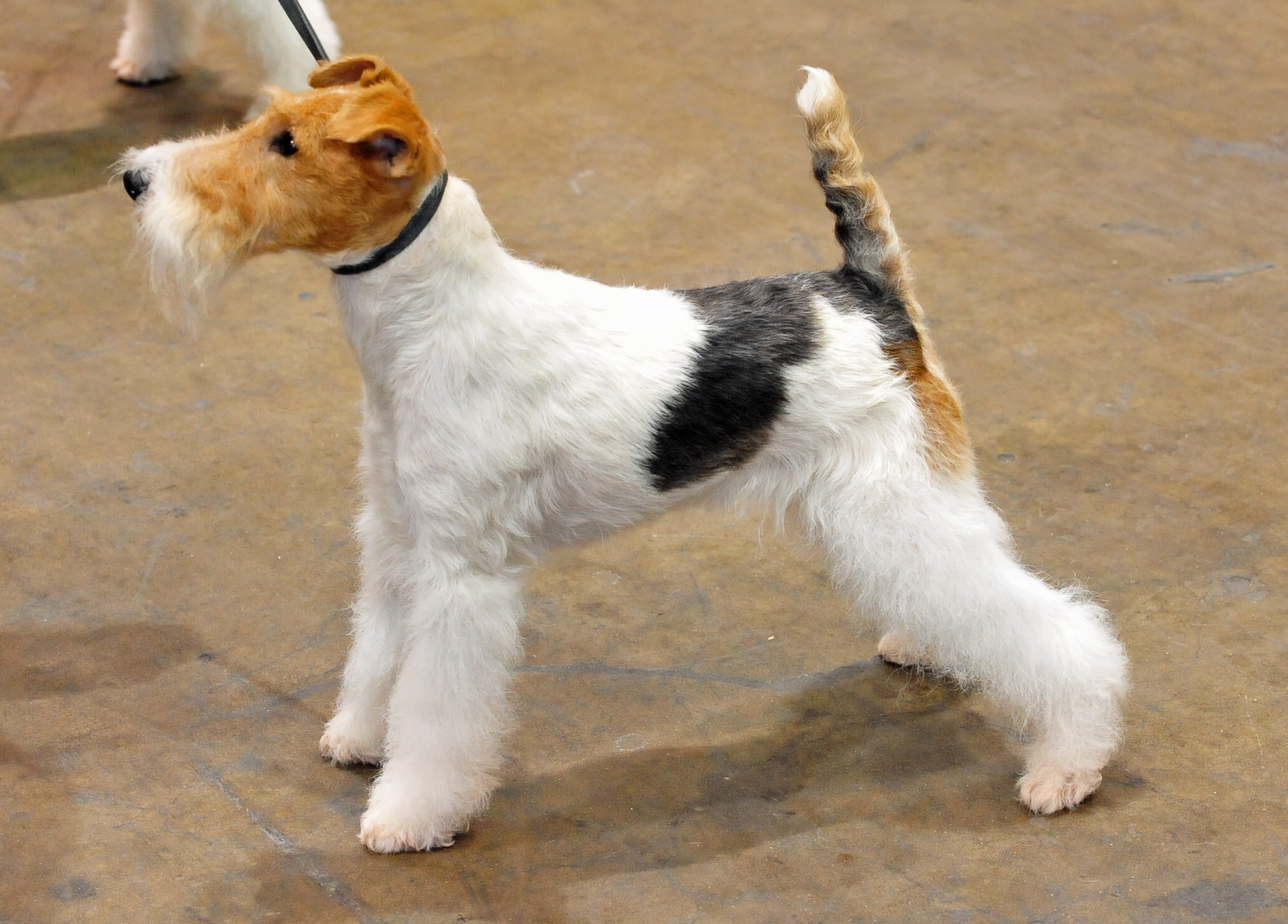 Fox Terrier